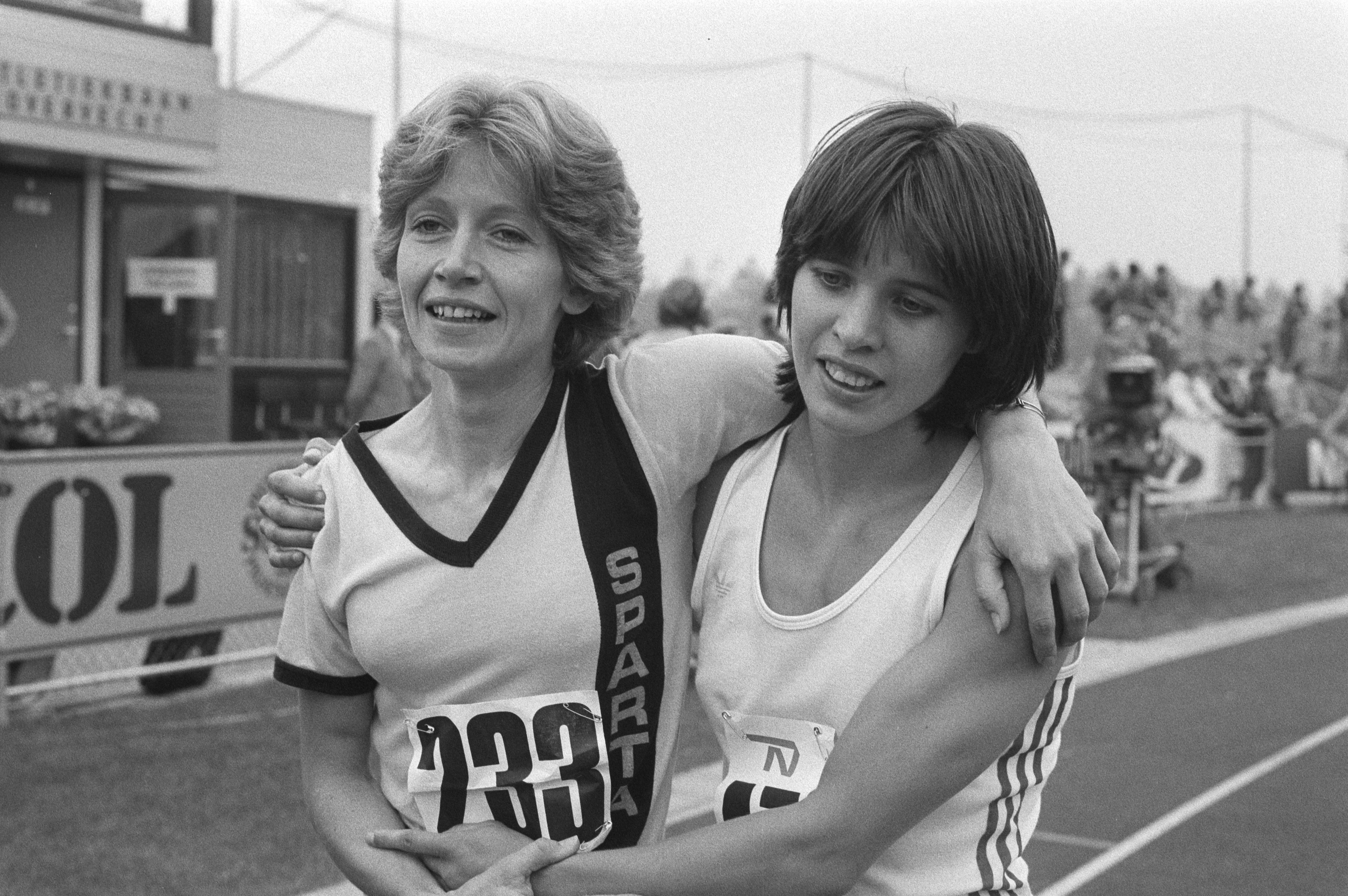 Collectie / Archief : Fotocollectie Anefo Reportage / Serie : Nederlandse kampioenschappen atletiek te Utrecht Beschrijving : Els Vader (rechts) wordt gefeliciteerd door Conny Vermazen Datum : 8 augustus 1981 Locatie : Utrecht (provincie), Utrecht (stad) Trefwoorden : atleten, vrouwen Persoonsnaam : Vader, Els, Vermazen,Conny Fotograaf : Croes, Rob C. / Anefo Auteursrechthebbende : Nationaal Archief Materiaalsoort : Negatief (zwart/wit) Nummer archiefinventaris : bekijk toegang 2.24.01.05 Bestanddeelnummer : 931-6173 Reacties Geplaatst door Joop Kant op 27 juli 2016 - 08:10. Op de foto staat links TILLY VERHOEF in plaats van Conny Vermazen. Geplaatst door Joop Kant op 27 juli 2016 - 08:14. Links op de foto staat niet Conny Vermazen maar TILLY VERHOEF.